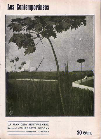 Portada de La manigua sentimental.